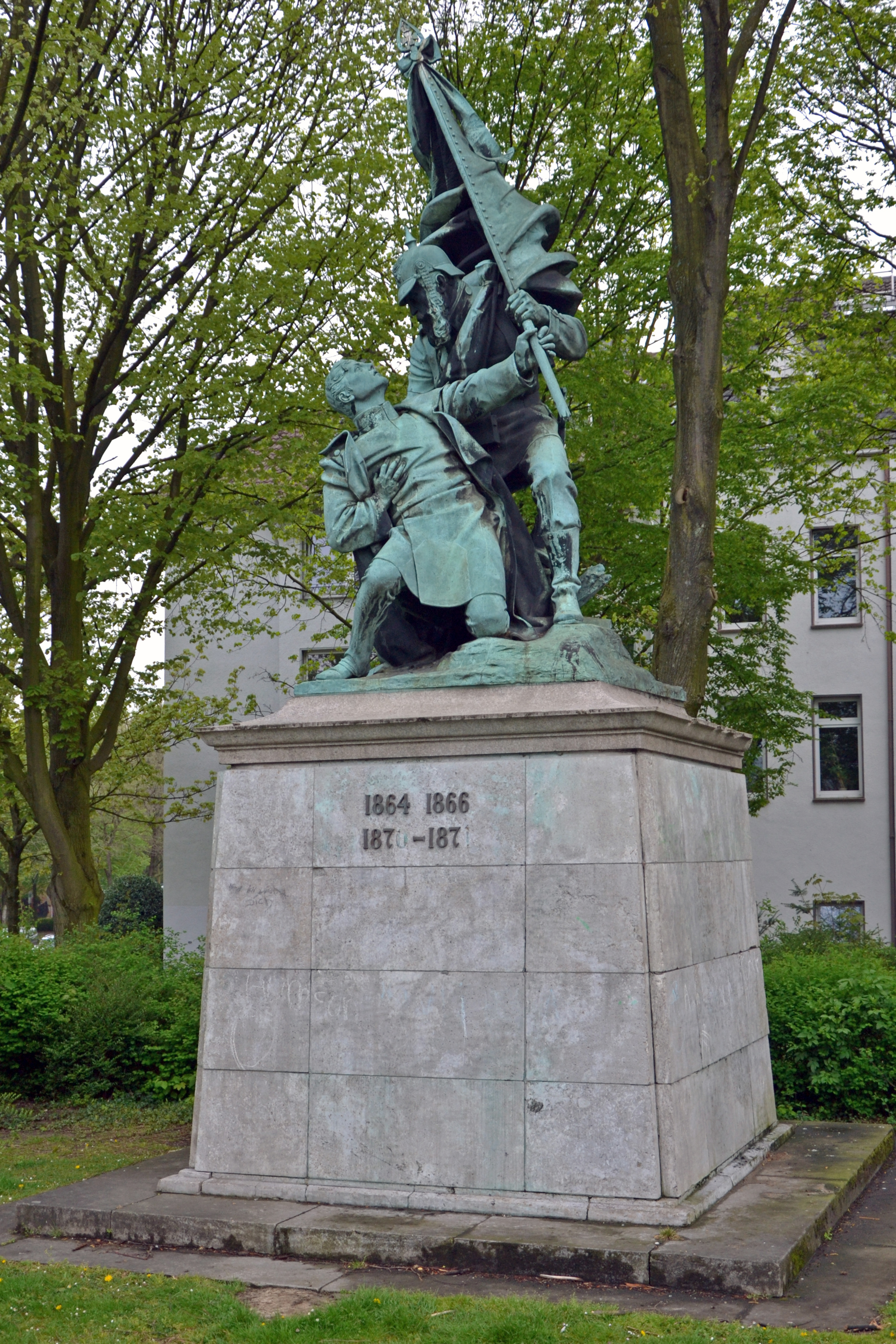 Am 2. September 1891 wurde das von Ernst Seger erschaffene Kriegerdenkmal für die Gefallenen der Deutschen Einigungskriege 1864, 1866 und 1870/71 auf dem Kopstadtplatz in Essener Zentrum enthüllt und 1958 in den Stadtteil Nordviertel versetzt.